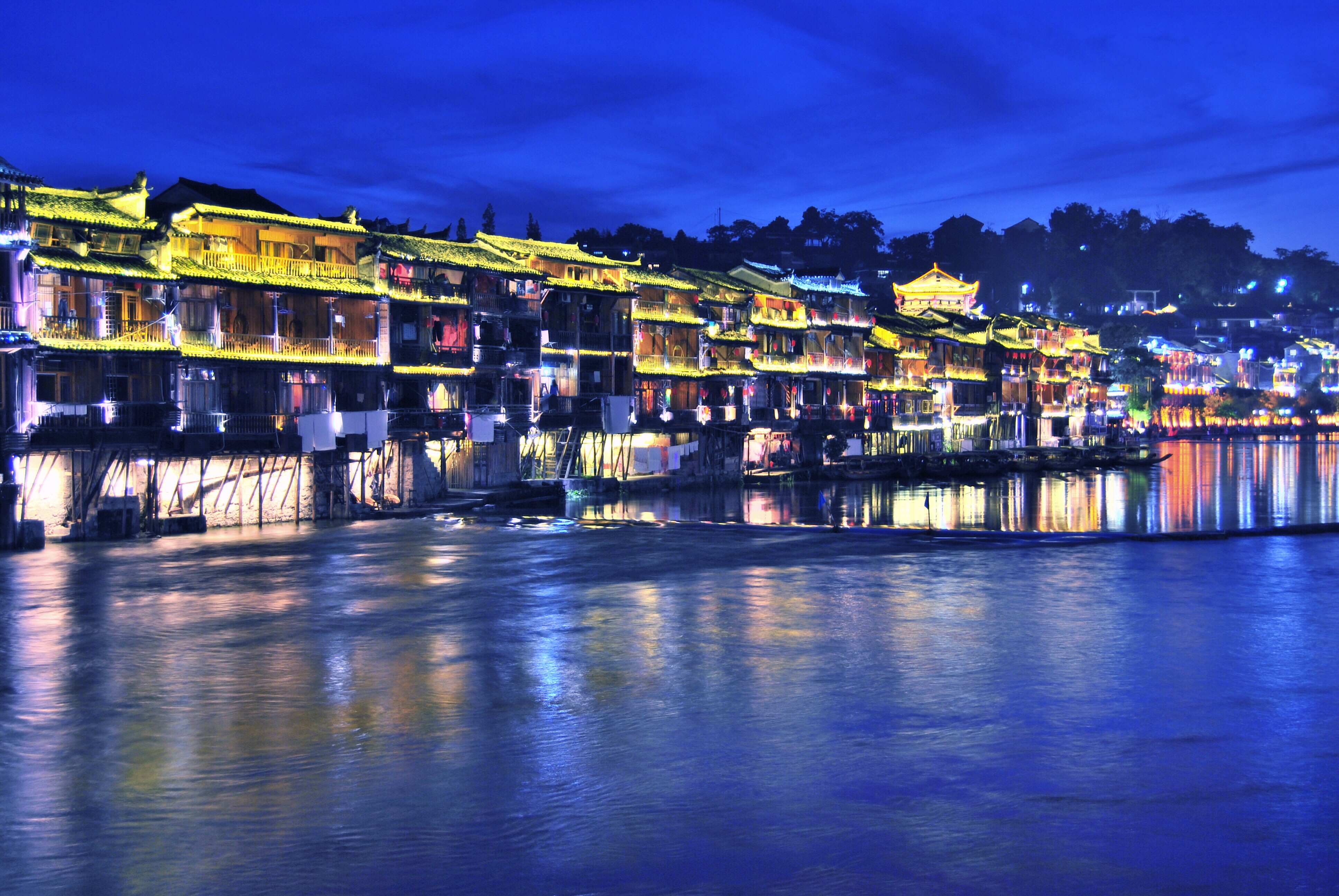 中文（中国大陆）: 一样的夜色，不同的灯光